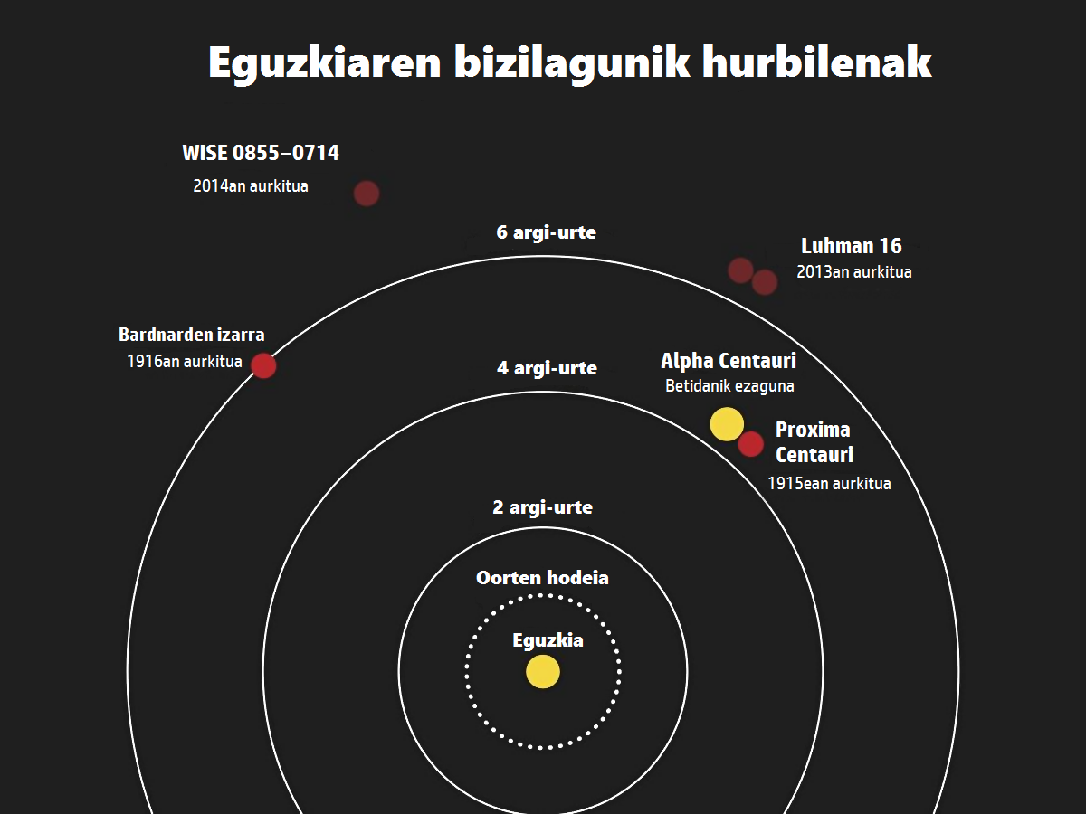 Eguzkiarengandik hurbilen dauden izarrak erakusten dituen irudia, haien aurkikuntza datekin batera.